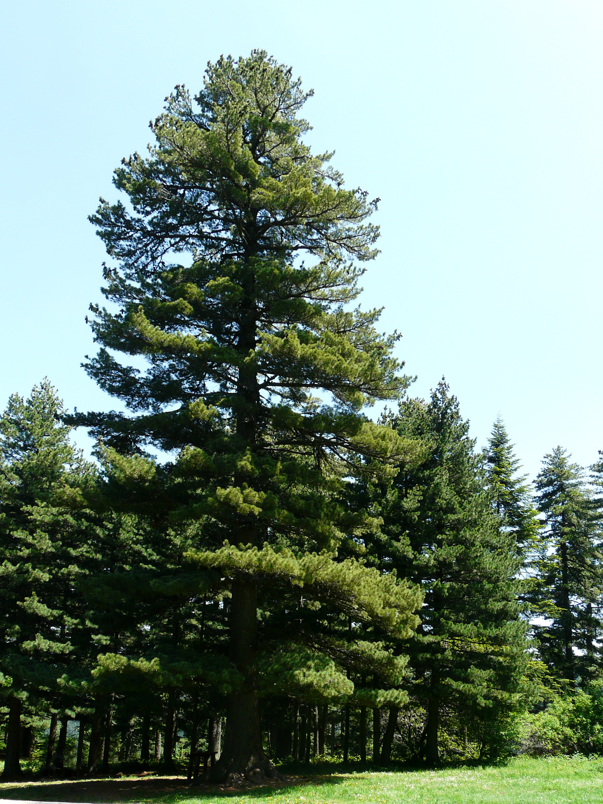 Molika Pinus peuce, Pelister, Macedonia